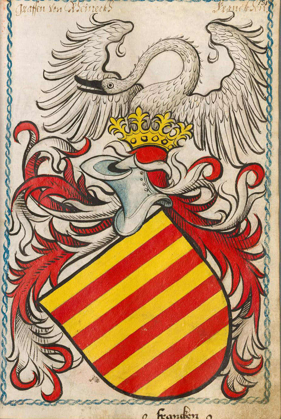 Scheibler'sches Wappenbuch , älterer Teil Graffen von Rheineckh Franckhen